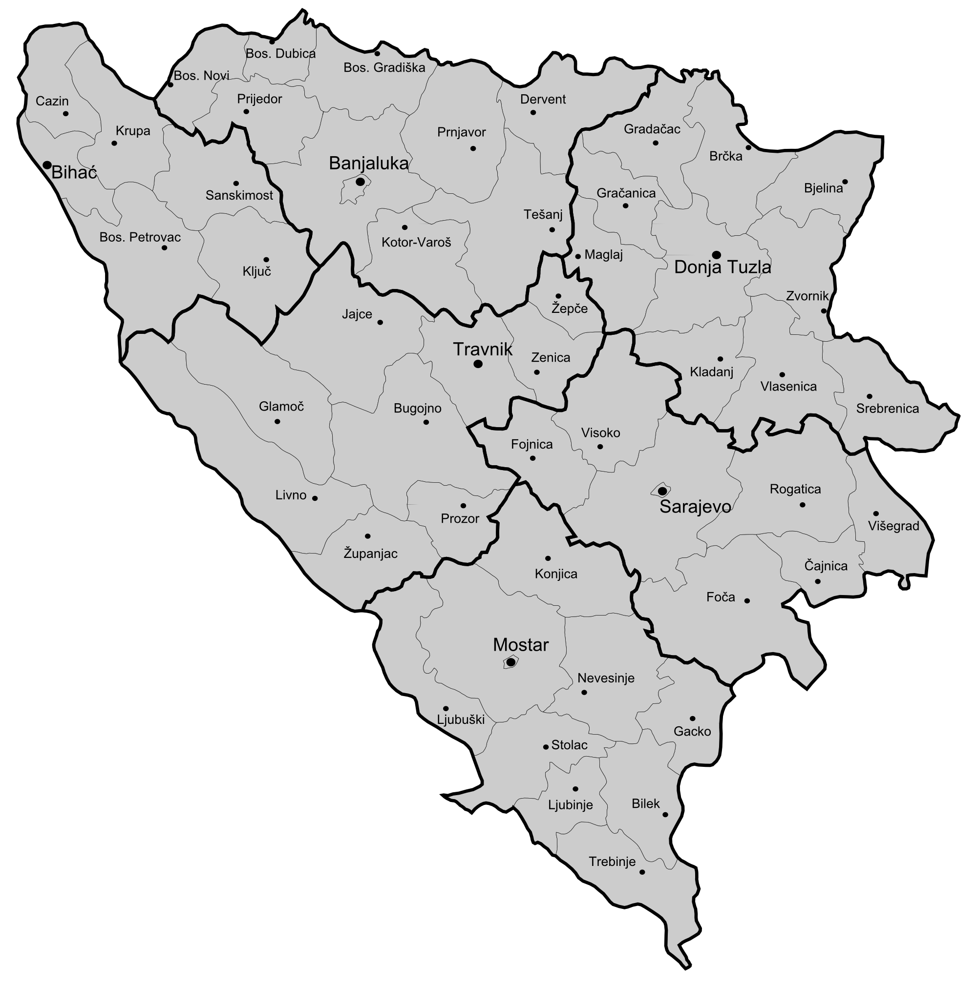 Administrativna podjela Bosne i Hercegovine 1895. godine